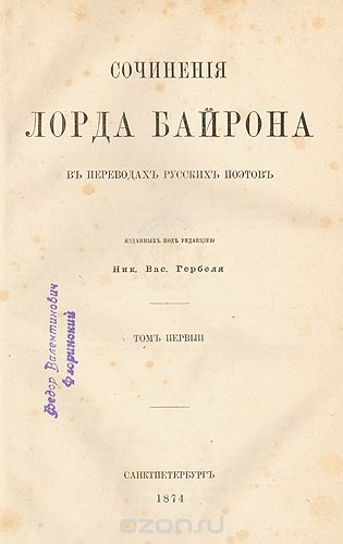 Титульный лист первого тома сочинений лорда Байрона (1874) со штемпелем личной библиотеки Фёдора Валентиновича Флоринского